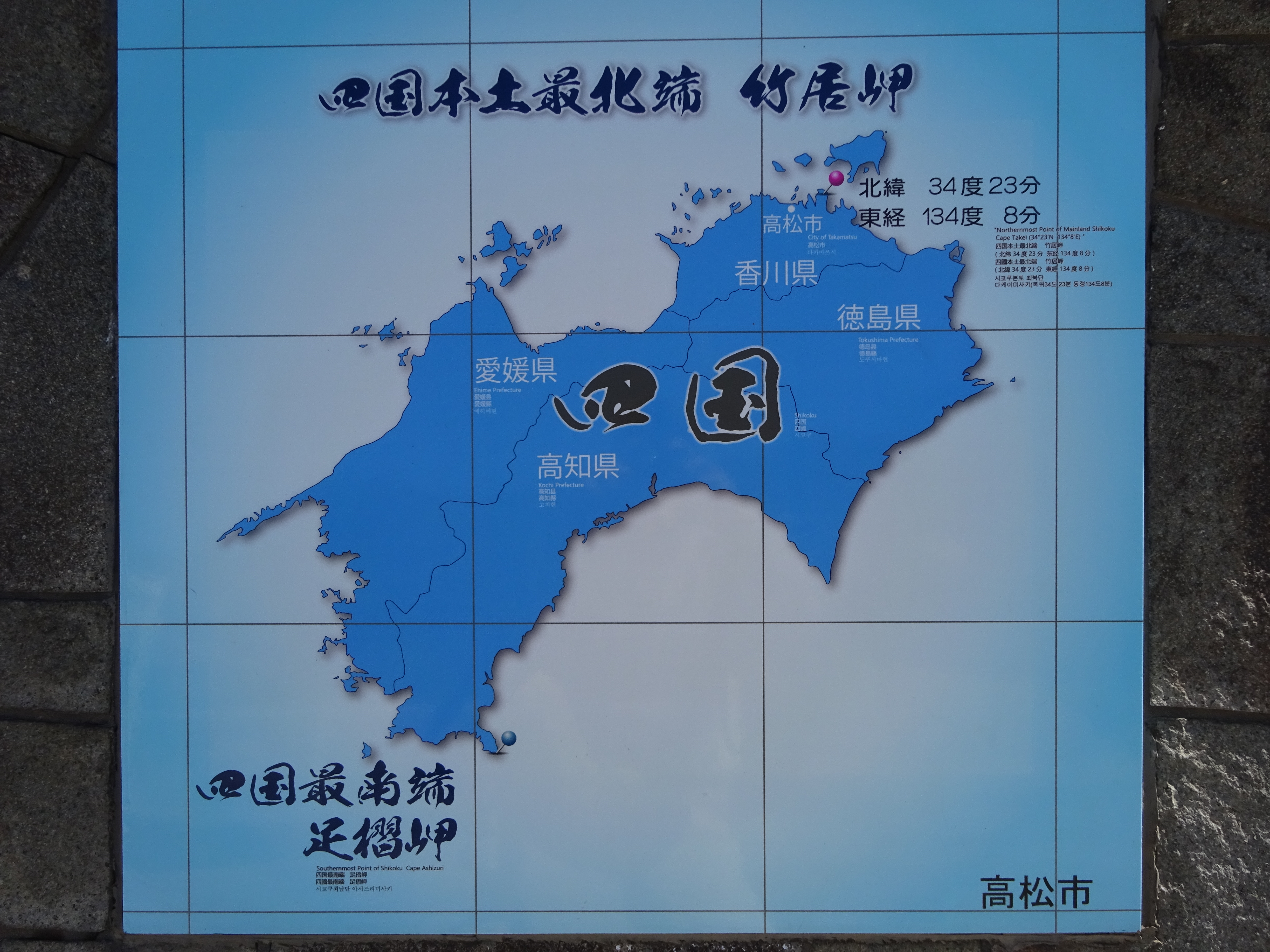 四国本土最北端の説明図（竹居岬・庵治町・高松市）